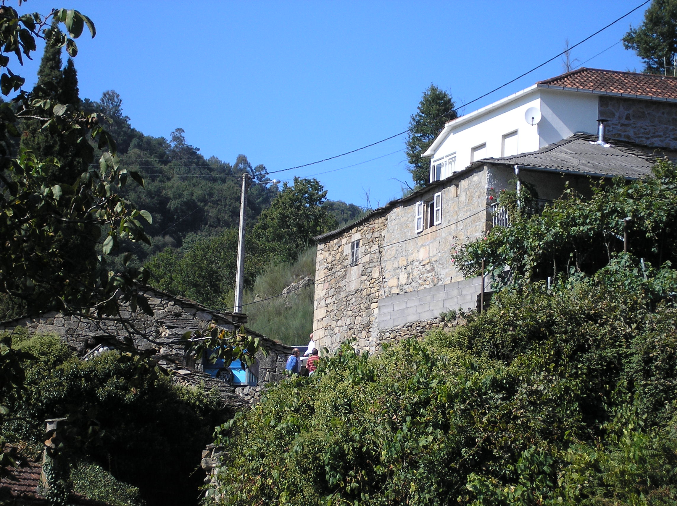 Carcacía, Oleiros, Carballedo